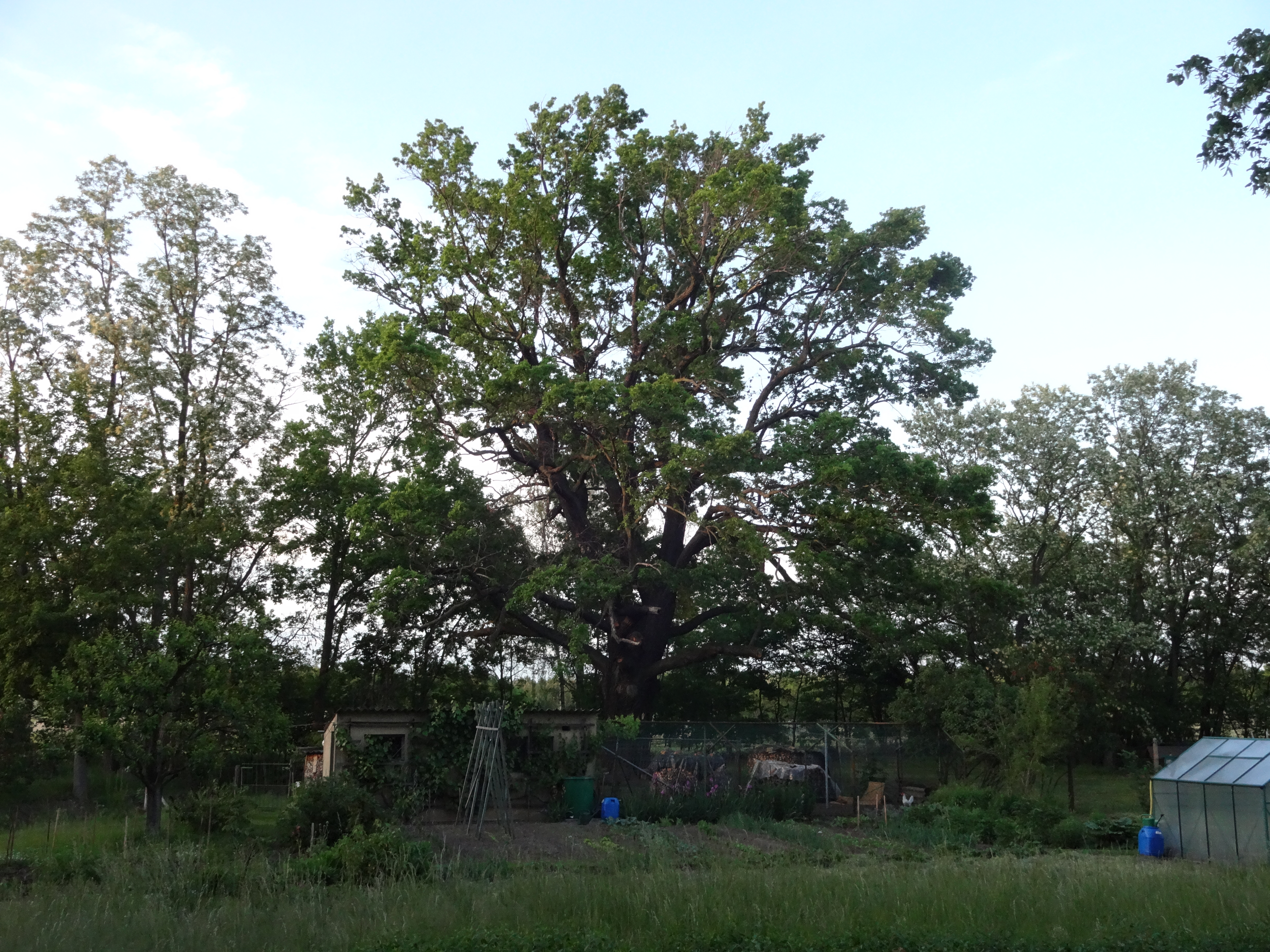 als Naturdenkmal geschützte Stieleiche hinter dem Grundstück Chausseestraße 1 in Zinnitz